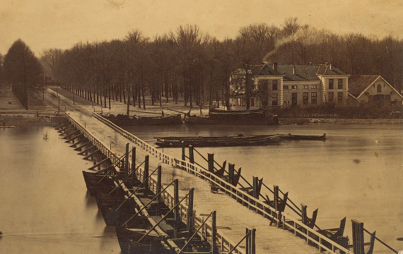 Boatbridge in Deventer 1876 - Schipbrug met het Wapen van Deventer (nu IJsselhotel)